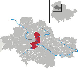 Weinbergen in Thuringia - Unstrut-Hainich-Kreis